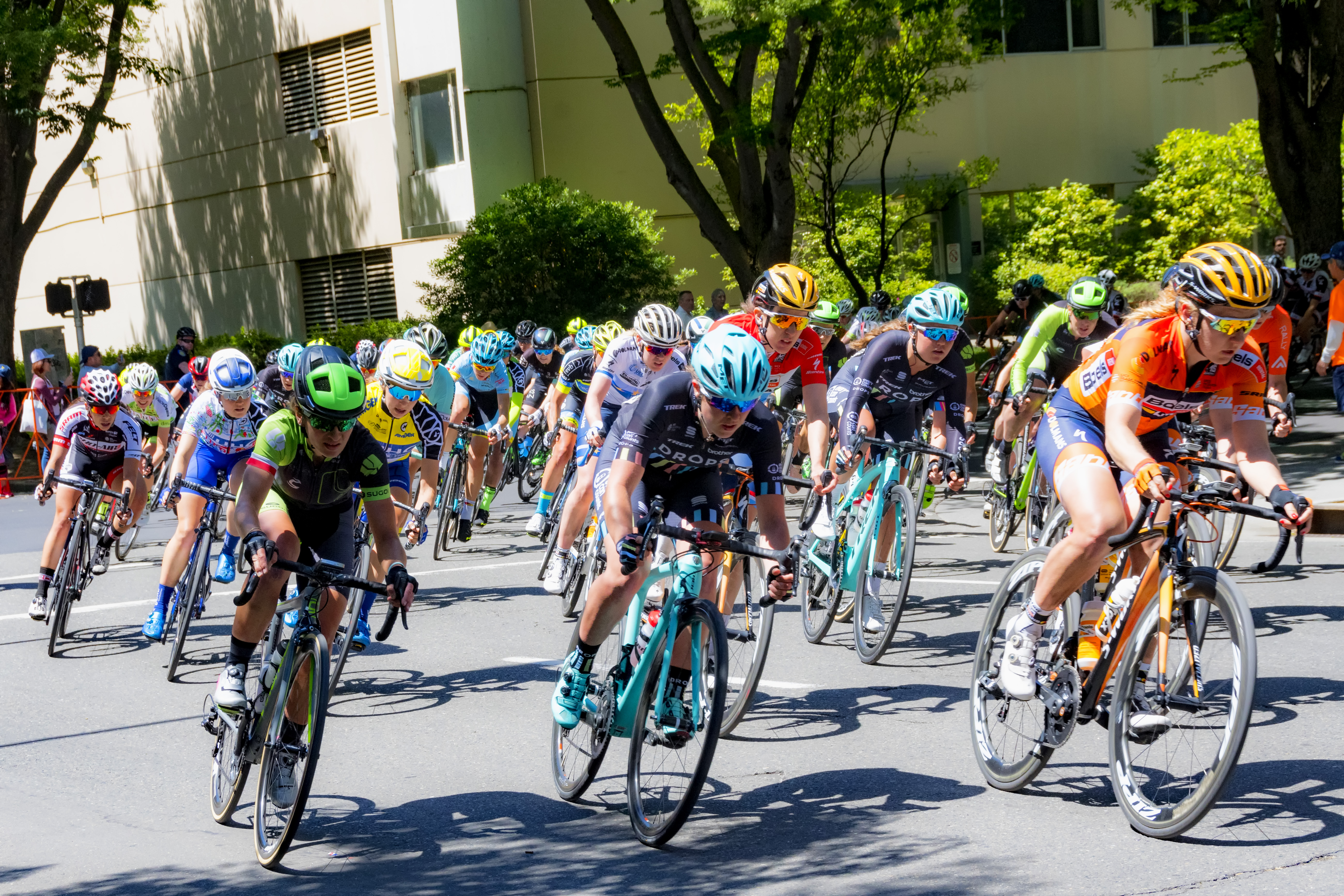 Paso del pelotón en la última etapa del Amgen Tour of California Women’s 2017